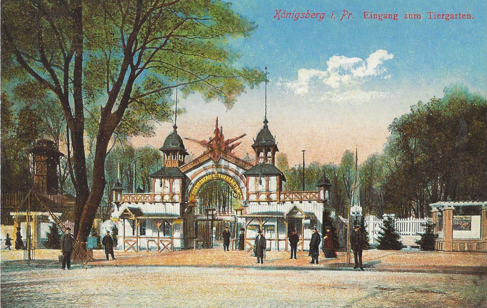 Eingang des Königsberger Tiergartens